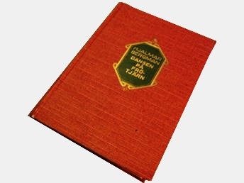 Omslag till "Dansen på Frötjärn" av Hjalmar Bergman 1915.